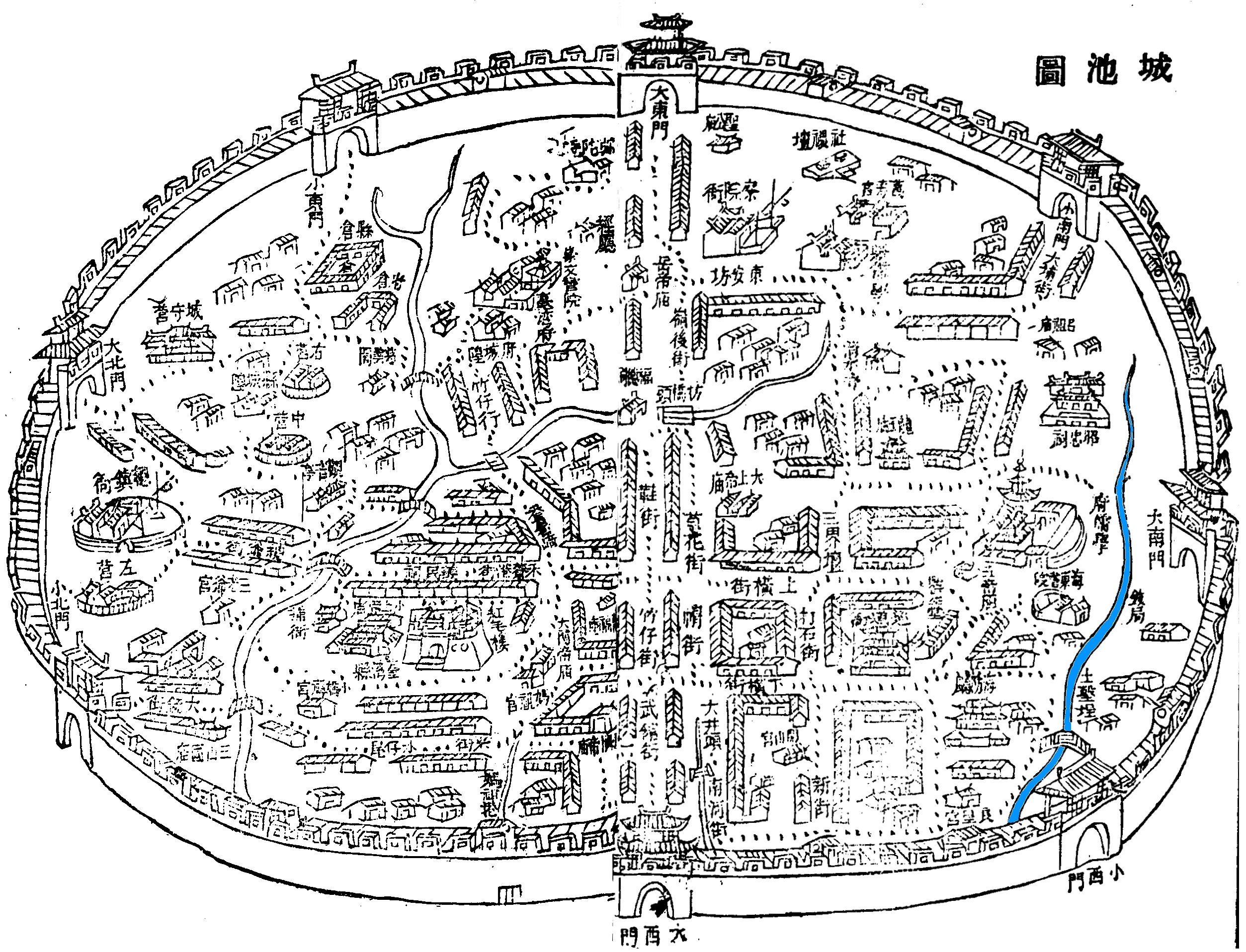 臺灣府城池圖上的福安坑溪